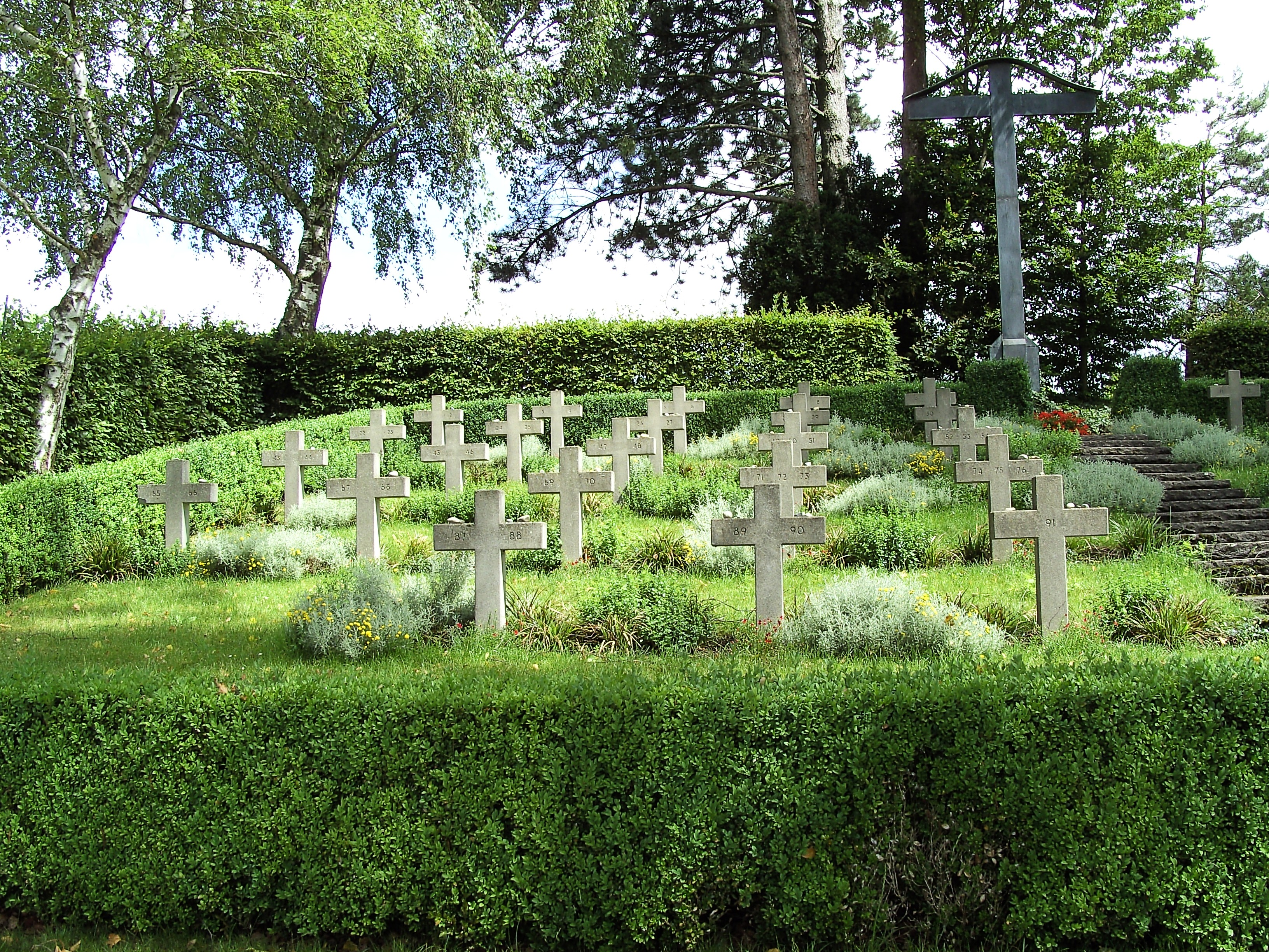 KZ-Friedhof in der Nähe von Birnau